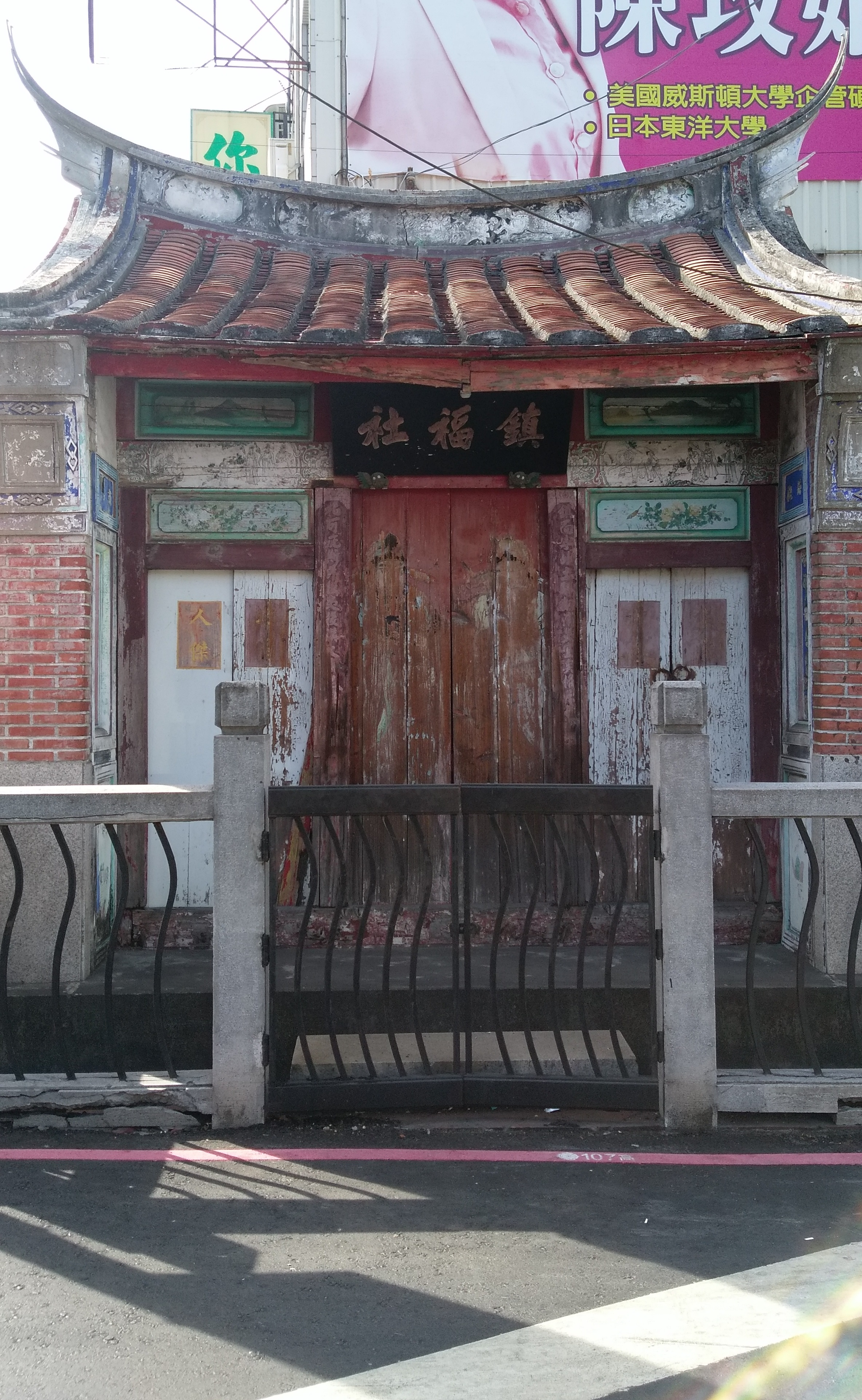 中文（台灣）: 鎮福廟（鎮福社）舊廟